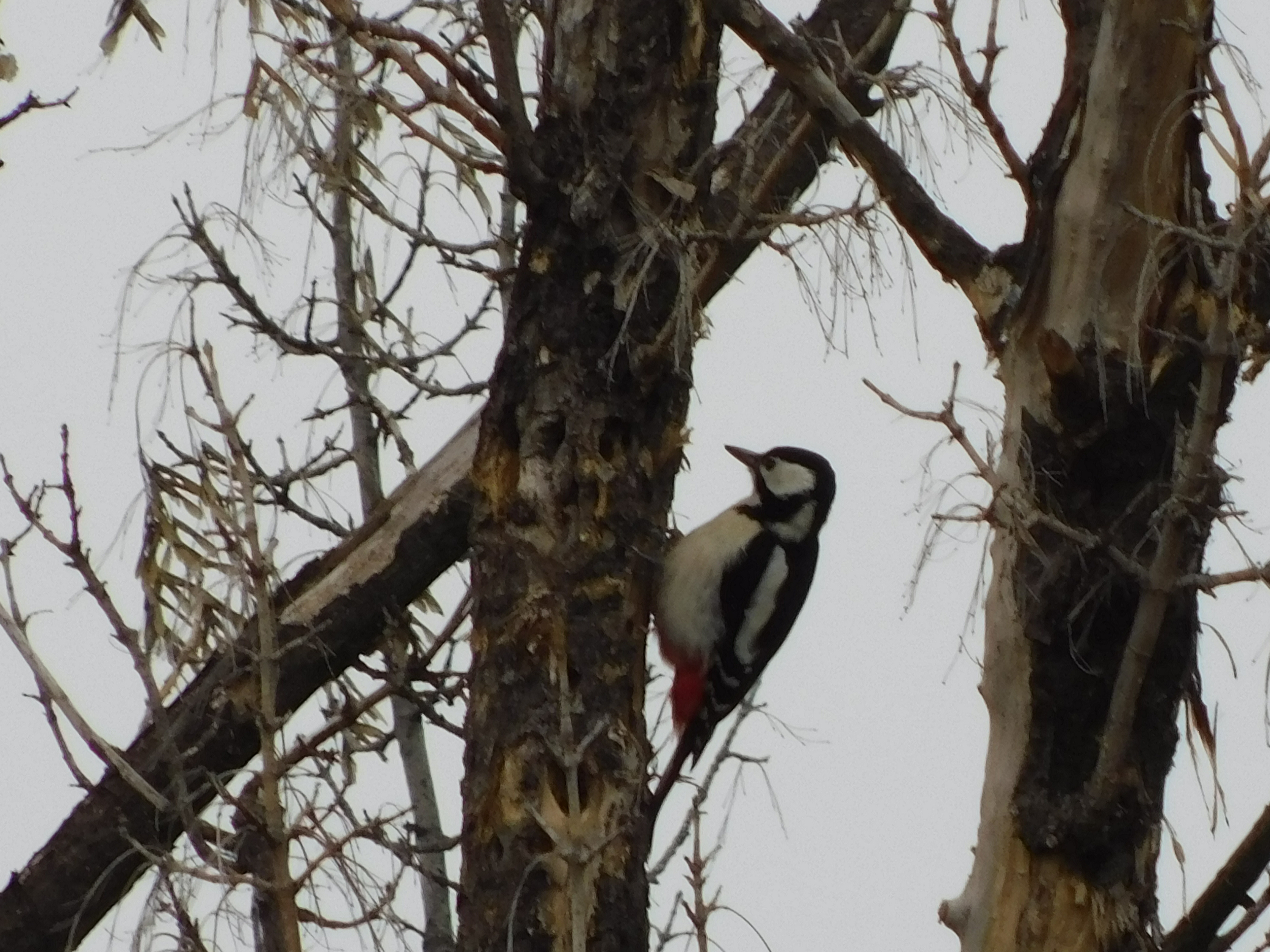 Гнездарица је у свим регионима и равномерно је распростањен у свим деловима Србије. Насељава све типове природних и сађених шумских састојина, мозаичне пределе и насеља у свим висинским зонама, од низије до горње шумске границе. Углавном одсуствује као гнездарица из обешумљених делова Војводине, док је чест и бројан на сеоби и током зиме. Најбројнији је у листопадним шумама. [13]Процењује се да се у Србији гнезди између 140 000 и 210 000 гнездећих парова, а бројност популације је оцењена као стабилна (Шћибан и сар.,2015).